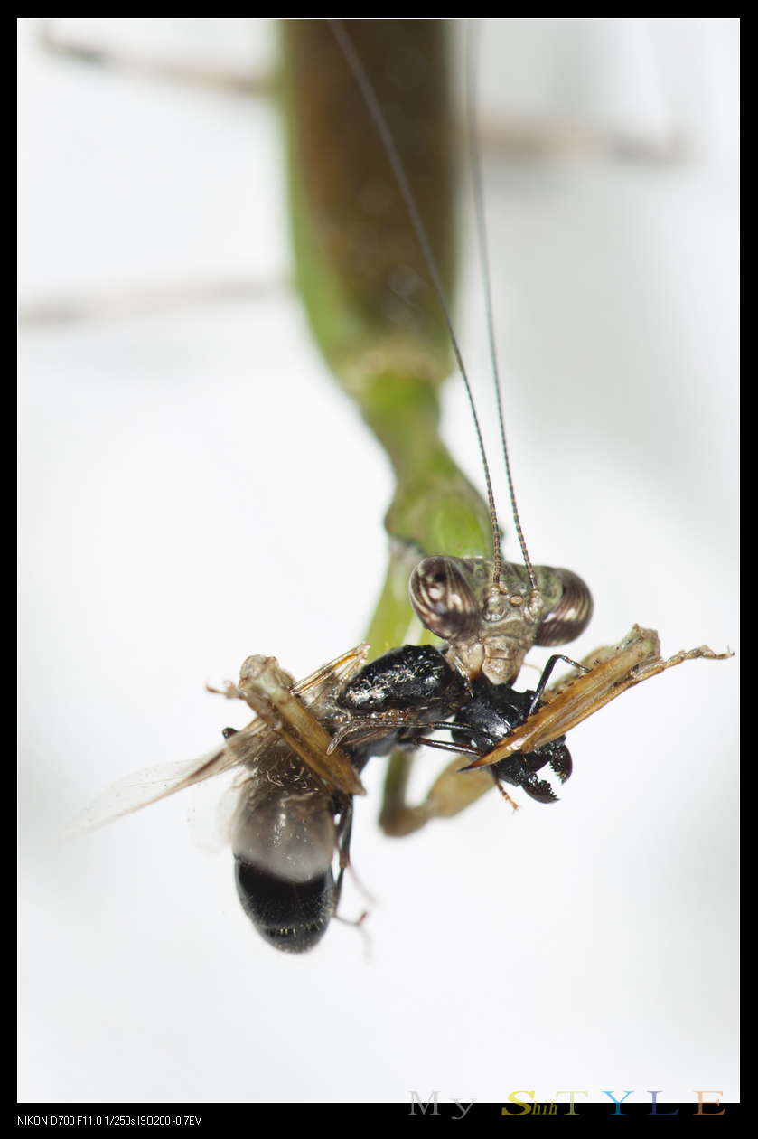 _DSK1330 Acromantis japonica